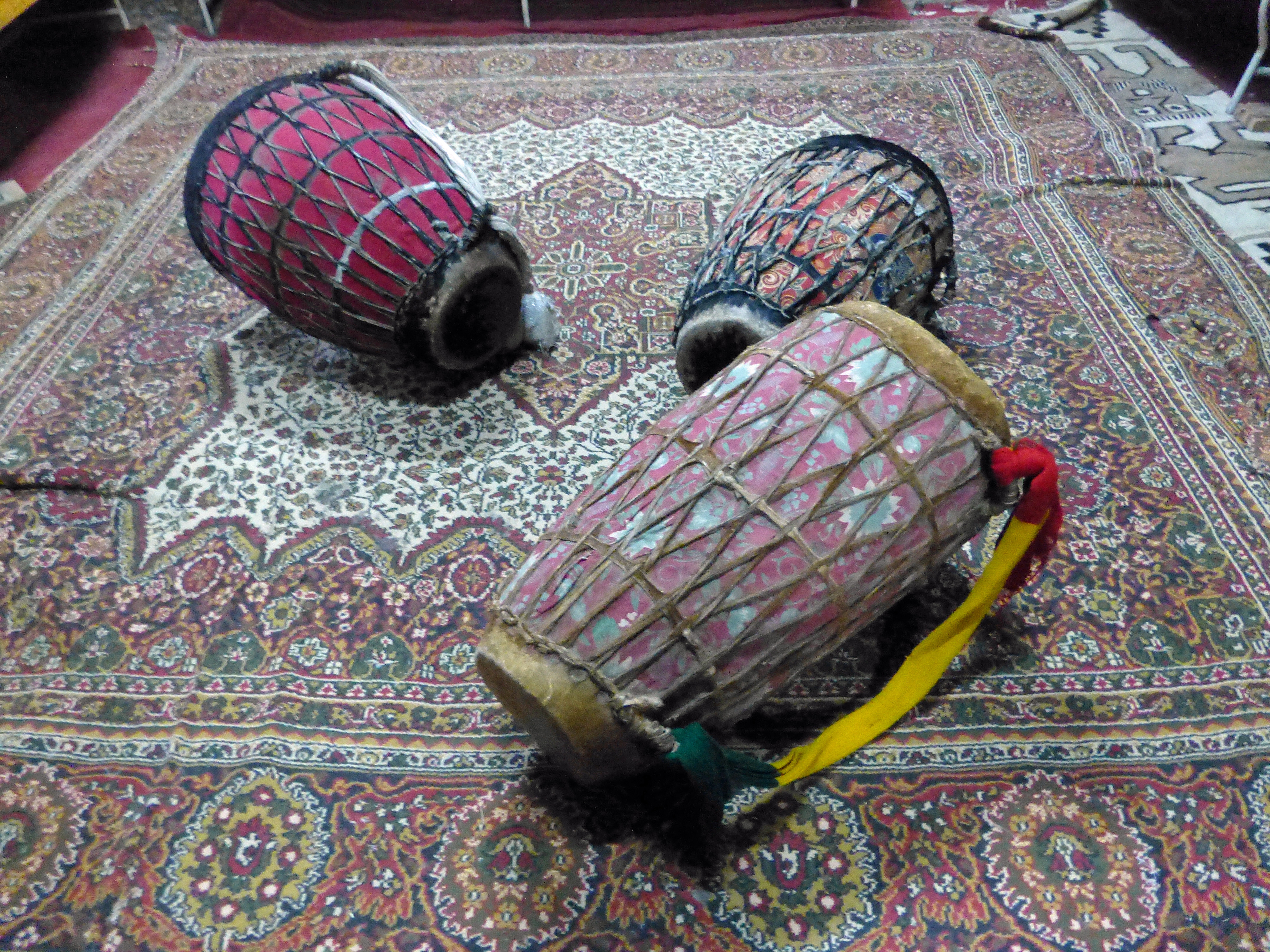 Tambours de cérémonie dans une église de Lalibela (Ethiopie)